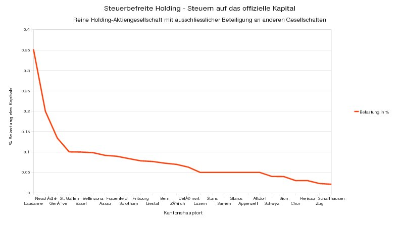 Steuerwettbewerb in der Schweiz: Holding - Kapitalbelastung durch Kantonssteuer in Prozenten 2007 Quelle: Steuerbelastung in der Schweiz, Kantonshauptorte und Kantonsziffern 2007, ESTV